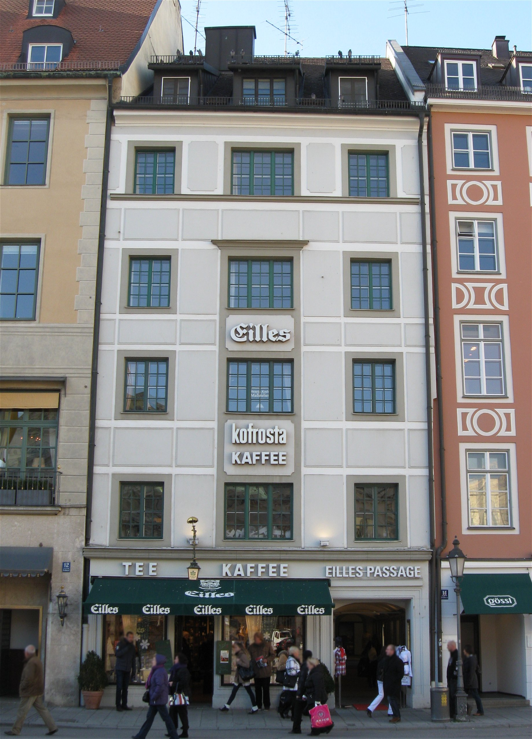 Residenzstraße 13; Eilles-Haus, Fassade mit erneuerter Putzgliederung, an zwei Hofseiten viergeschossige Arkaden der 1. Hälfte des 16. Jh. erhalten.